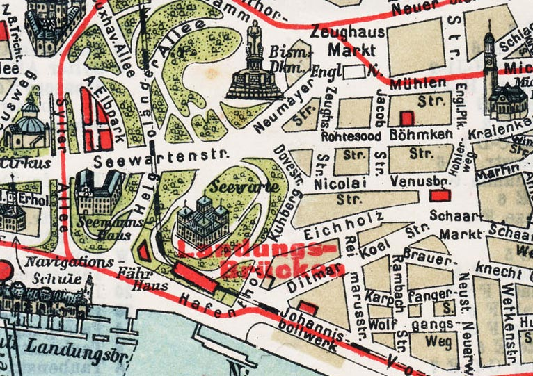 Kartenausschnitt mit der Position der Deutschen Seewarte